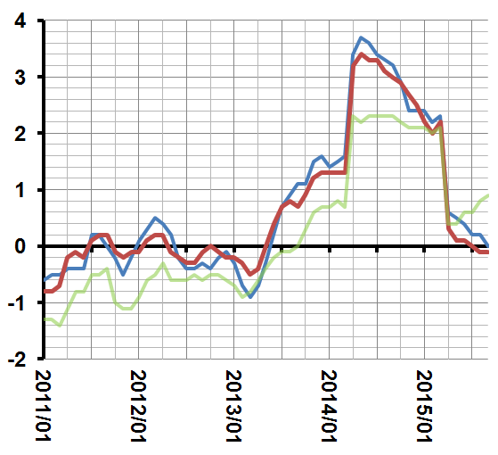 前年同月比の消費者物価の推移。 のデータより自作した。水色は総合、赤は生鮮食品を除く総合、薄い緑は食料（酒類を除く）及びエネルギーを除く総合である。